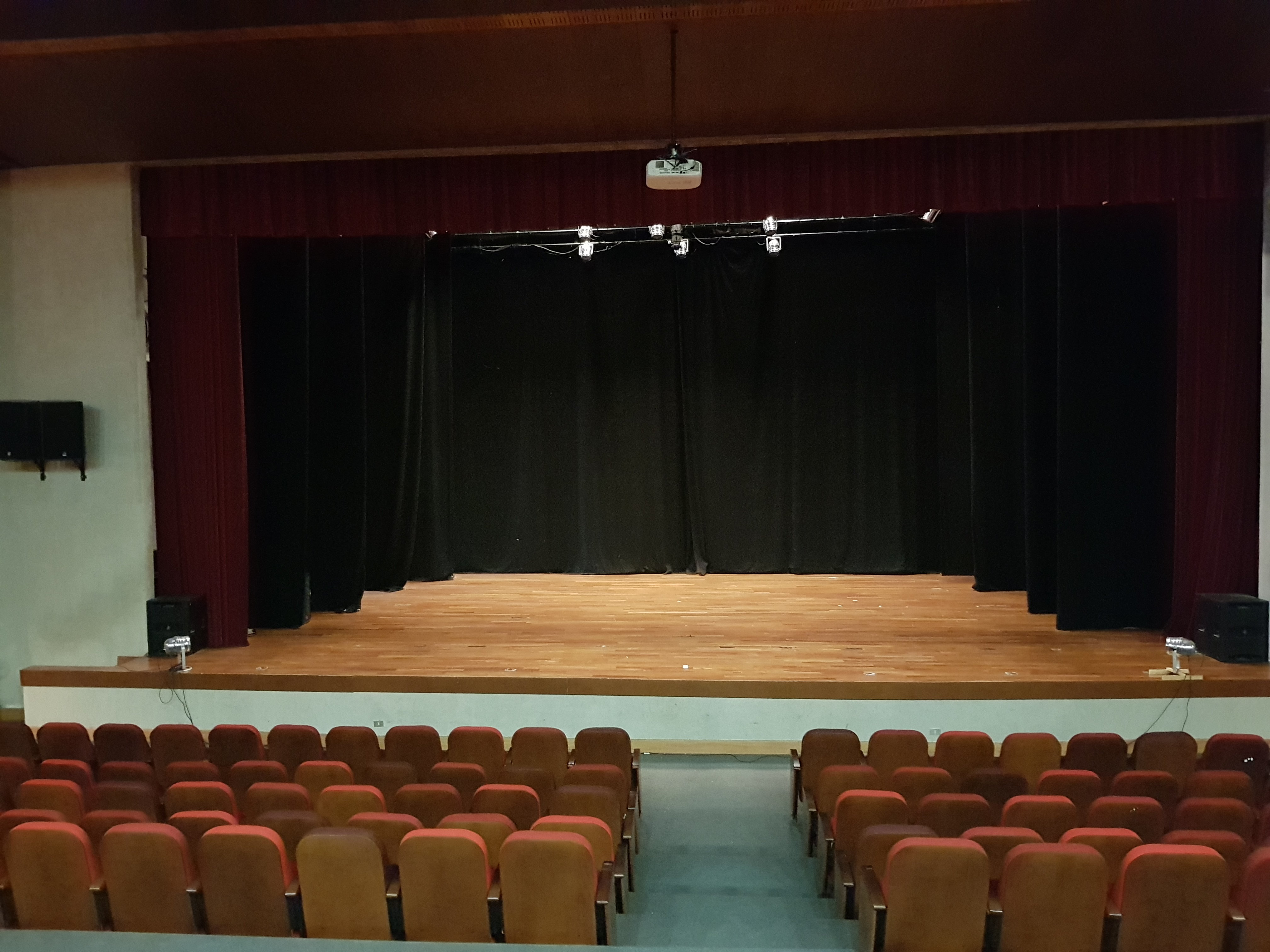 Fotografía tomada al escenario del area de teatro del Centro Cultural Teatro Serrano de la Provincia de Melipilla, Chile